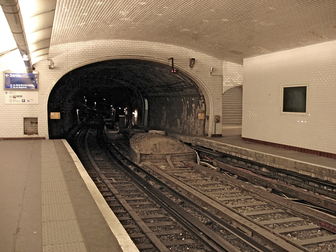 Station Porte Maillot de la ligne 1 du métro de Paris, France.